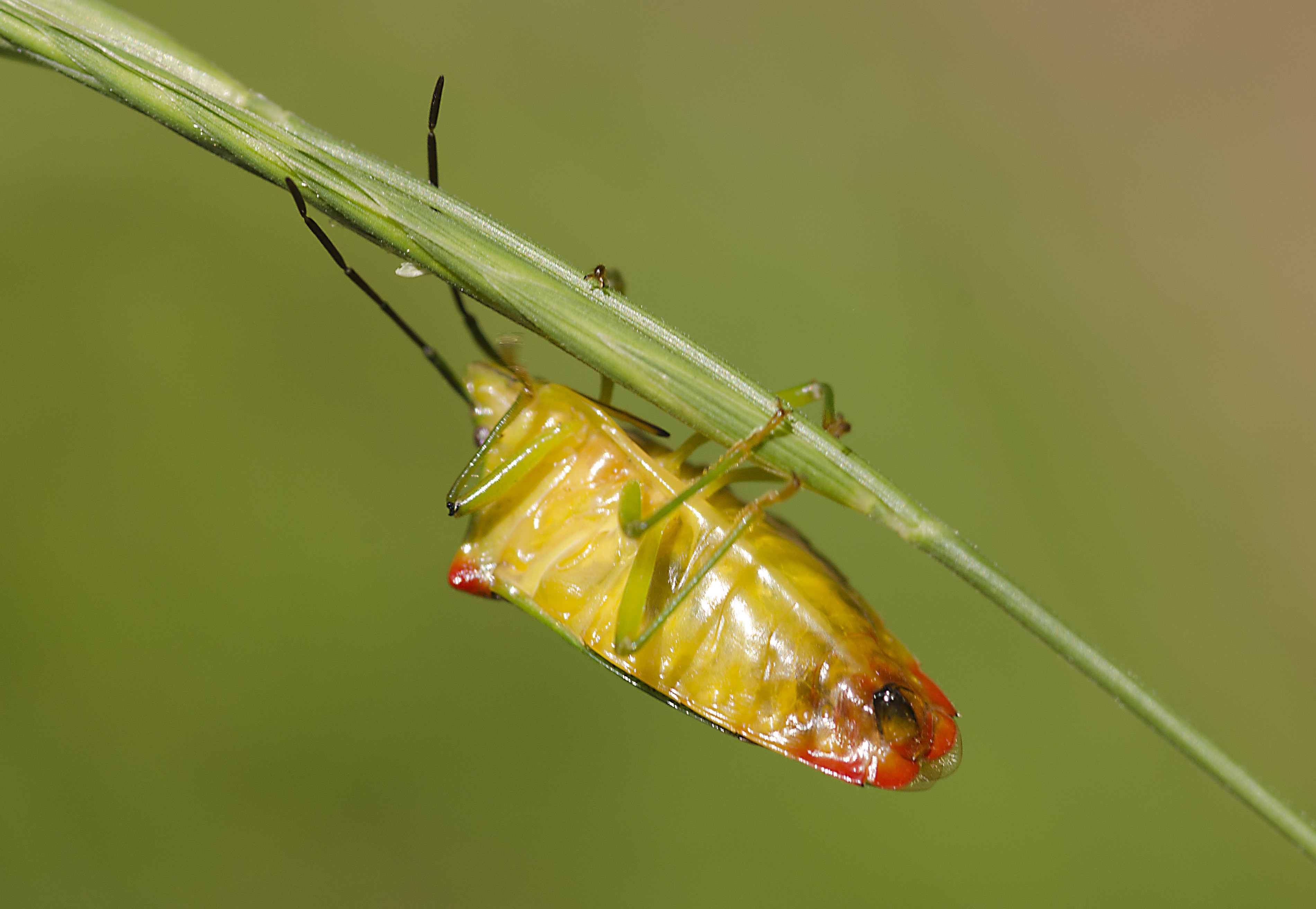 Wipfel-Stachelwanze (Acanthosoma haemorrhoidale), aufgenommen im Wald bei Stuttgart